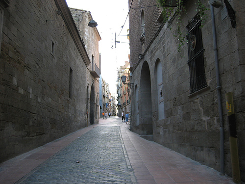 Calle Caballeros de Lleida, a la derecha el Oratorio de la Virgen de los Dolores y a la izquierda el Convento del Roser.